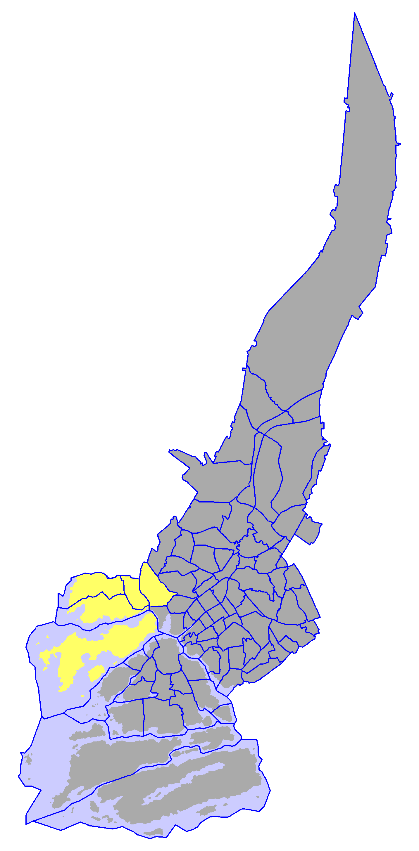 Ward of Naantalintie, in Turku